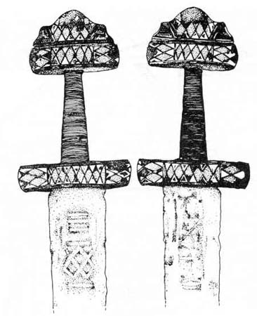 Meč z 10.storočia z archeologickej lokality Breh, Krásna nad Hornádom, Košice mesto.